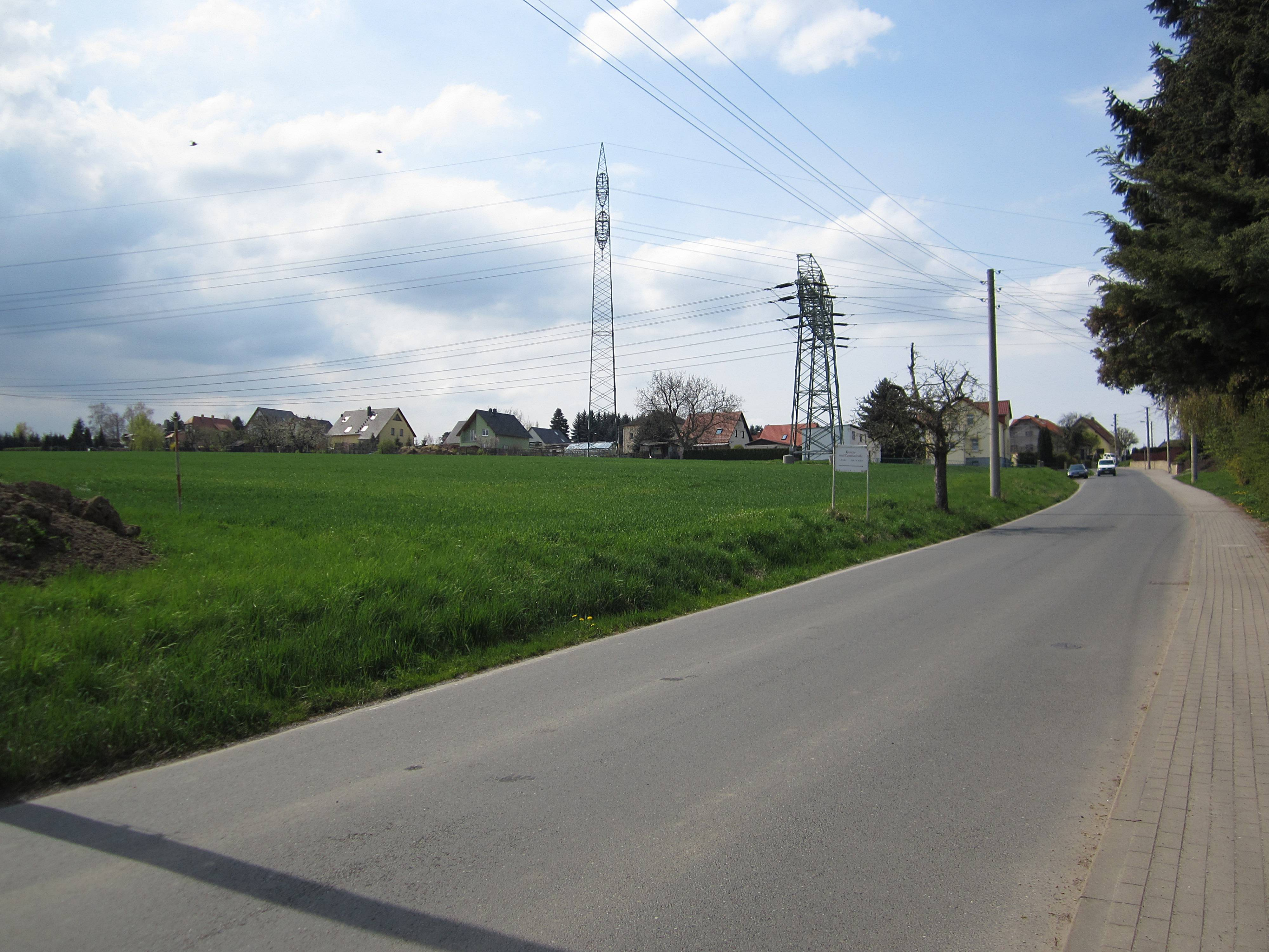 Oberer Teil von Ockerwitz, von der Ockerwitzer Allee aus nach Westen gesehen